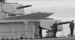 Forward QF 4-inch Mk V guns on Australian destroyer HMAS Waterhen.